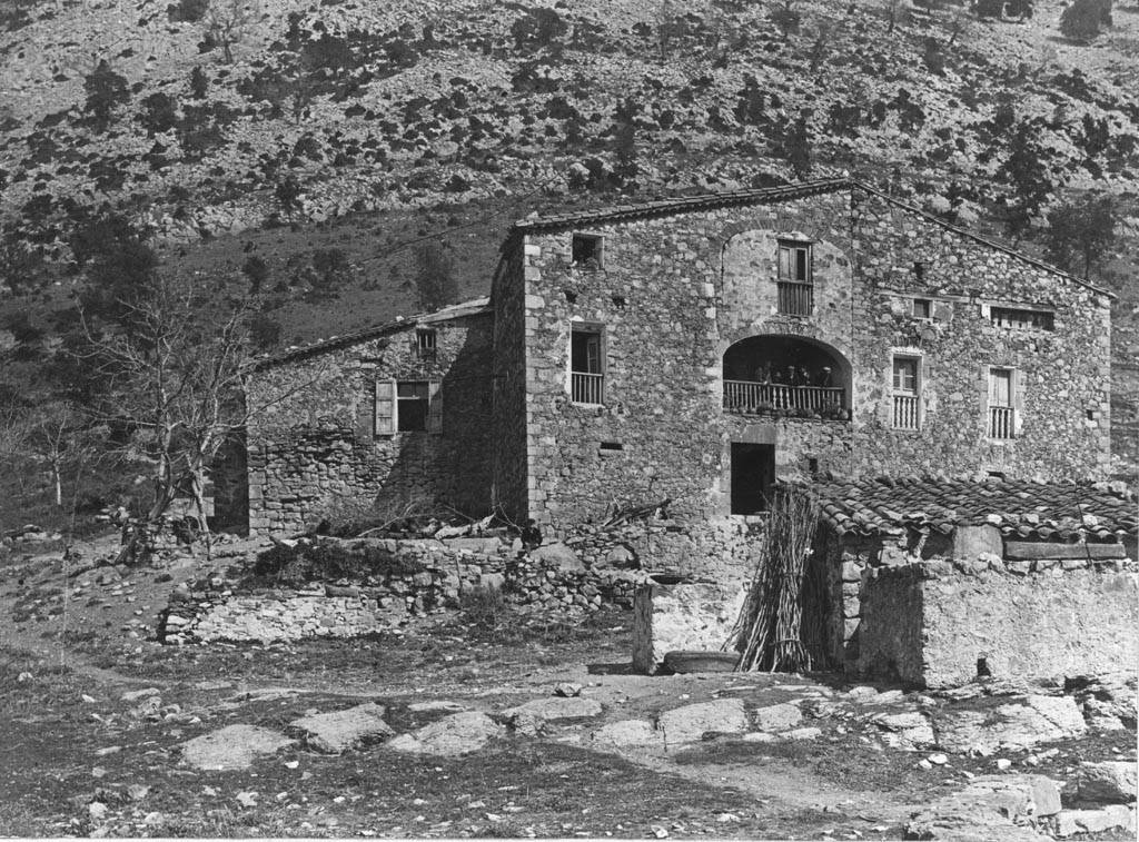 Façana principal de Can Nou de Bassegoda. Juli Vintró i Casallachs (Entre 1890 i 1911)